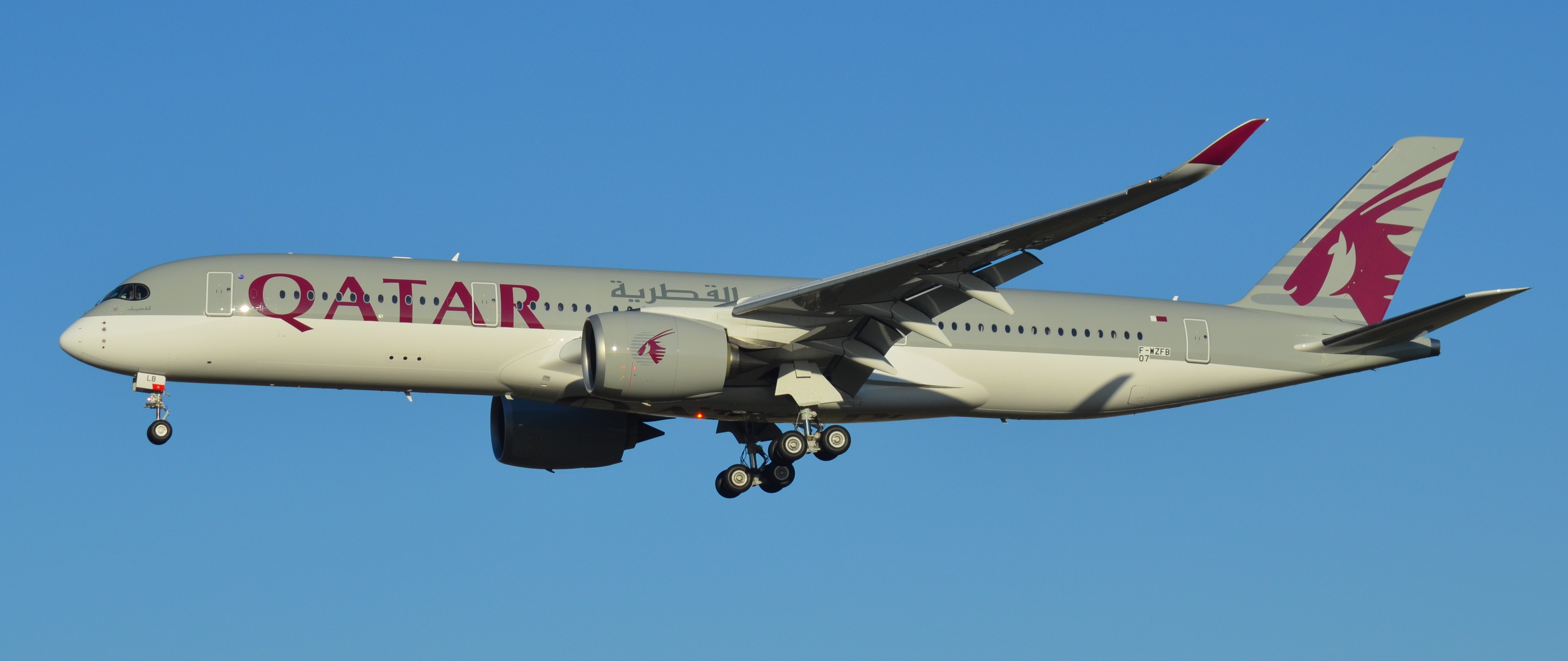 350.900 QATAR AIRWAYS F-WZFB 07 N°2 09 02 15 TLS